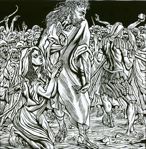 Графическая работа, продольная ксилография